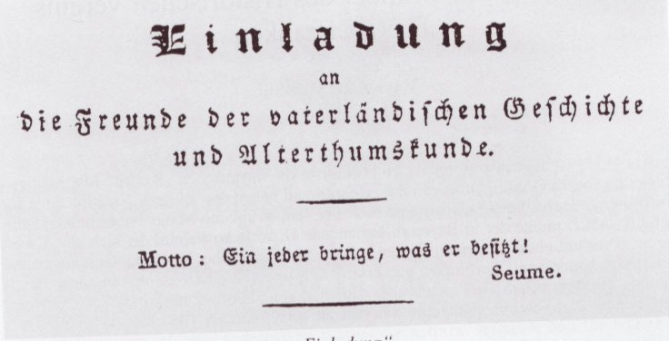 Einladung an die "Freunde der vaterländischen Geschichte" zu einem ersten Treffen 1827